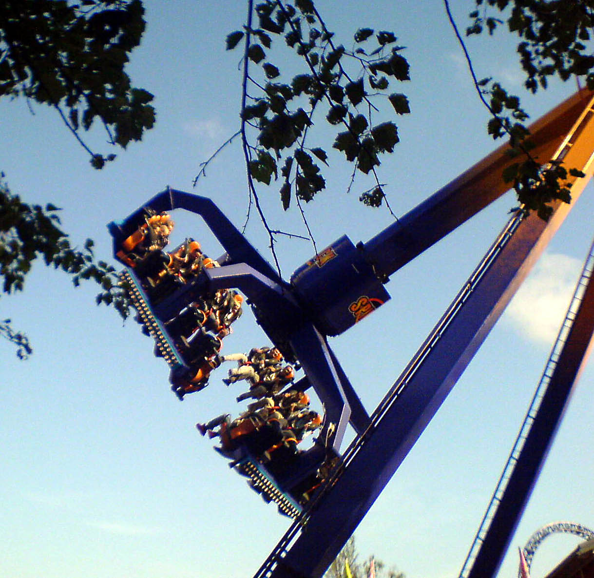 SpinRock